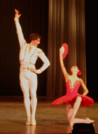 Творческий вечер М. Вежновец и Ю.Ковалёва. "Дон Кихот"